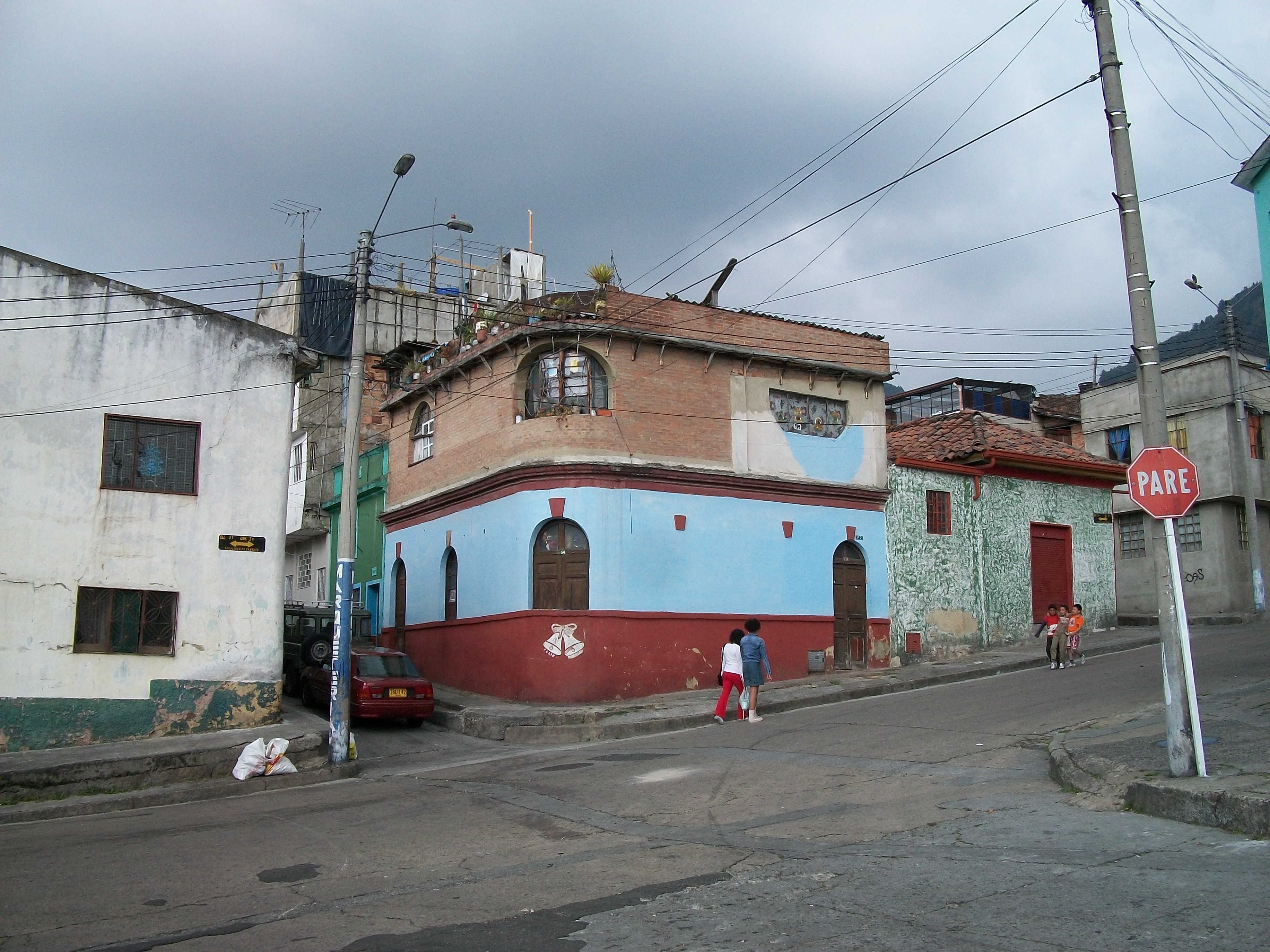 Perseverancia sector norte, calle Treinta y una con carrera Cuarta.